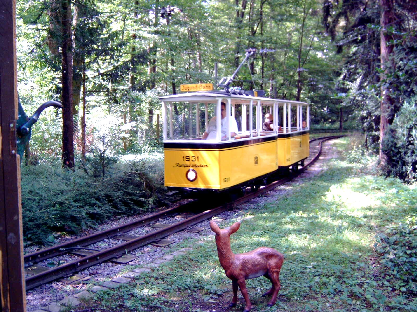 Kinderstraßenbahn Rumpelstilzchen auf der Rundkursstrecke am Straßenbahnerwaldheim Stuttgart-Degerloch, vor der Remise